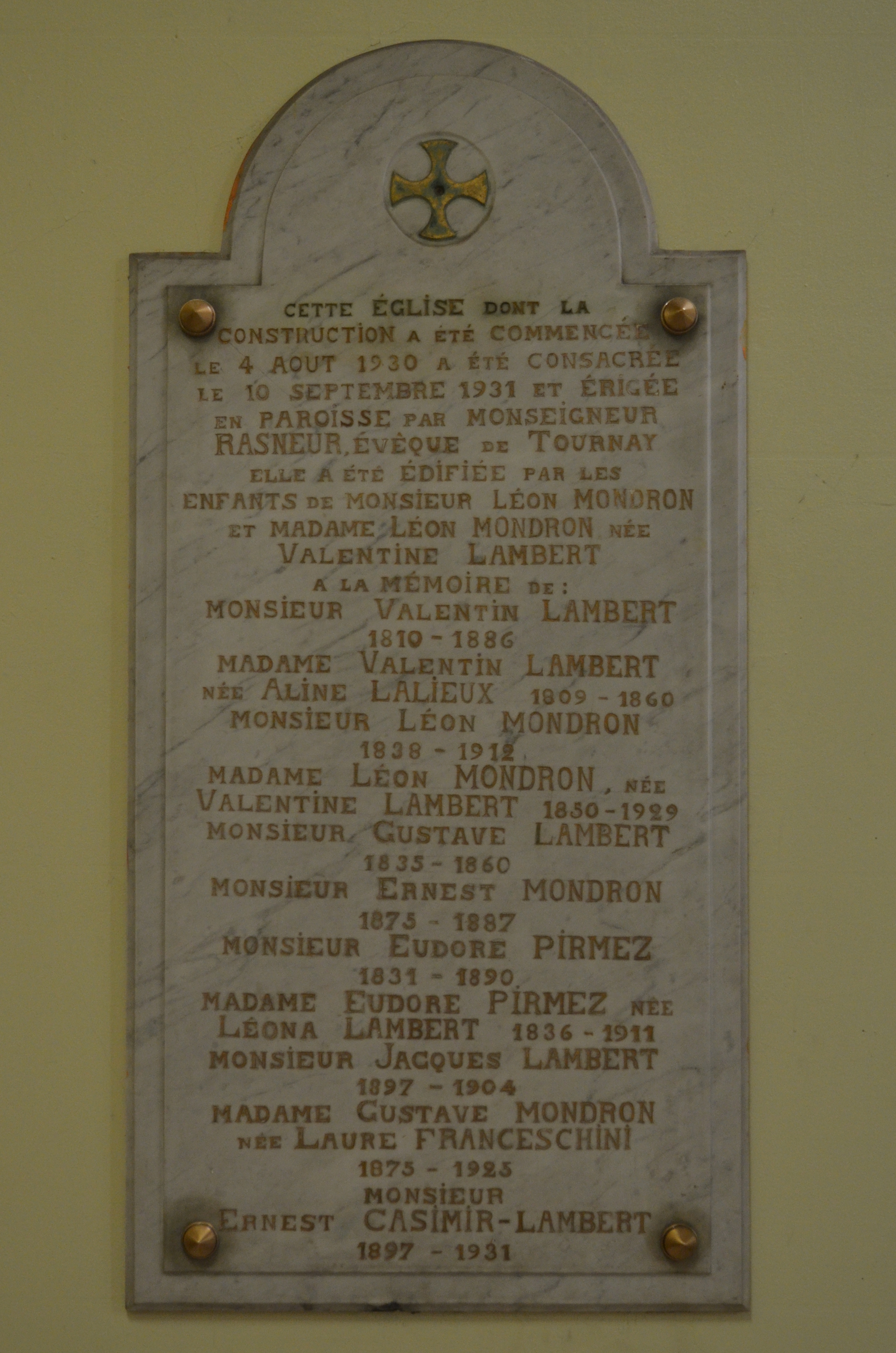 Jumet (Charleroi-Belgique) - Château Mondron et église Saint-Lambert.